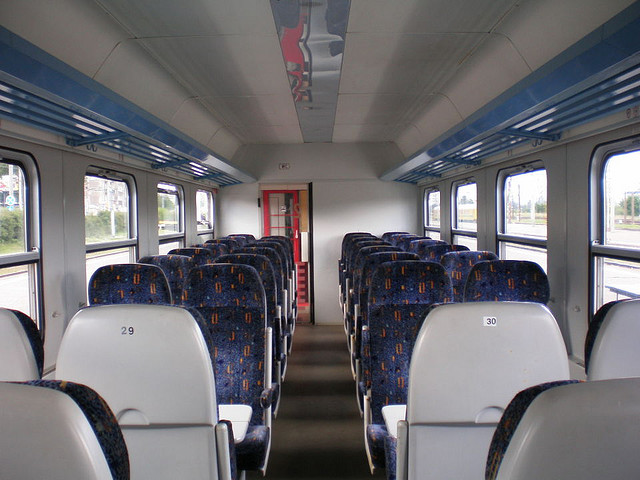 2007.06.17 - 062 PKP PR car interior